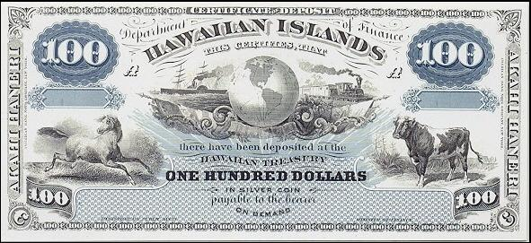 Billete de cien dólares hawaianos